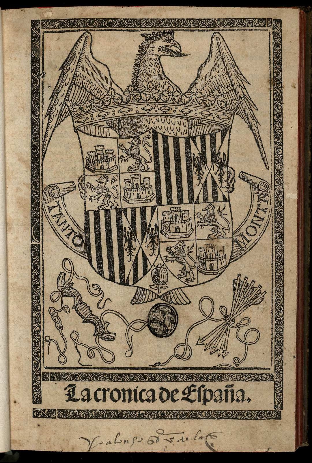 Crónica de España Autor: Valera, Diego de (1412-ca. 1488) Fecha: 1493 Datos de edición: En vuestra muy noble [et] insigne cibdad de çaragoça fue impressa a costa y espensas del dicho Paulo hurus